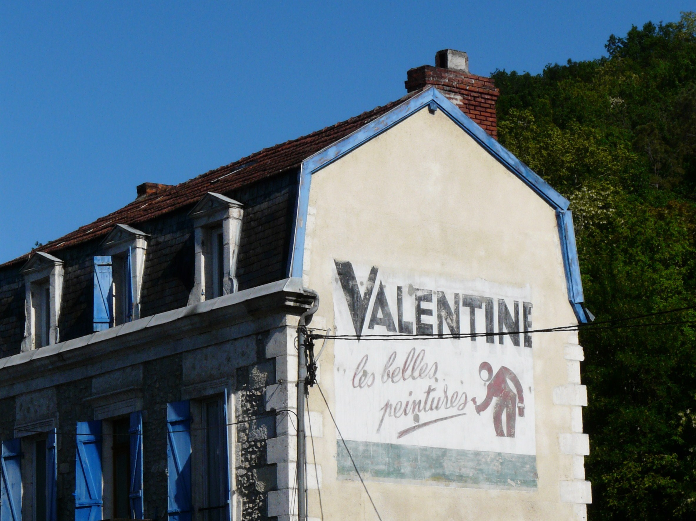 Publicité peinte pour la peinture Valentine sur le pignon d'un immeuble, route d'Angoulême, Périgueux, Dordogne, France.